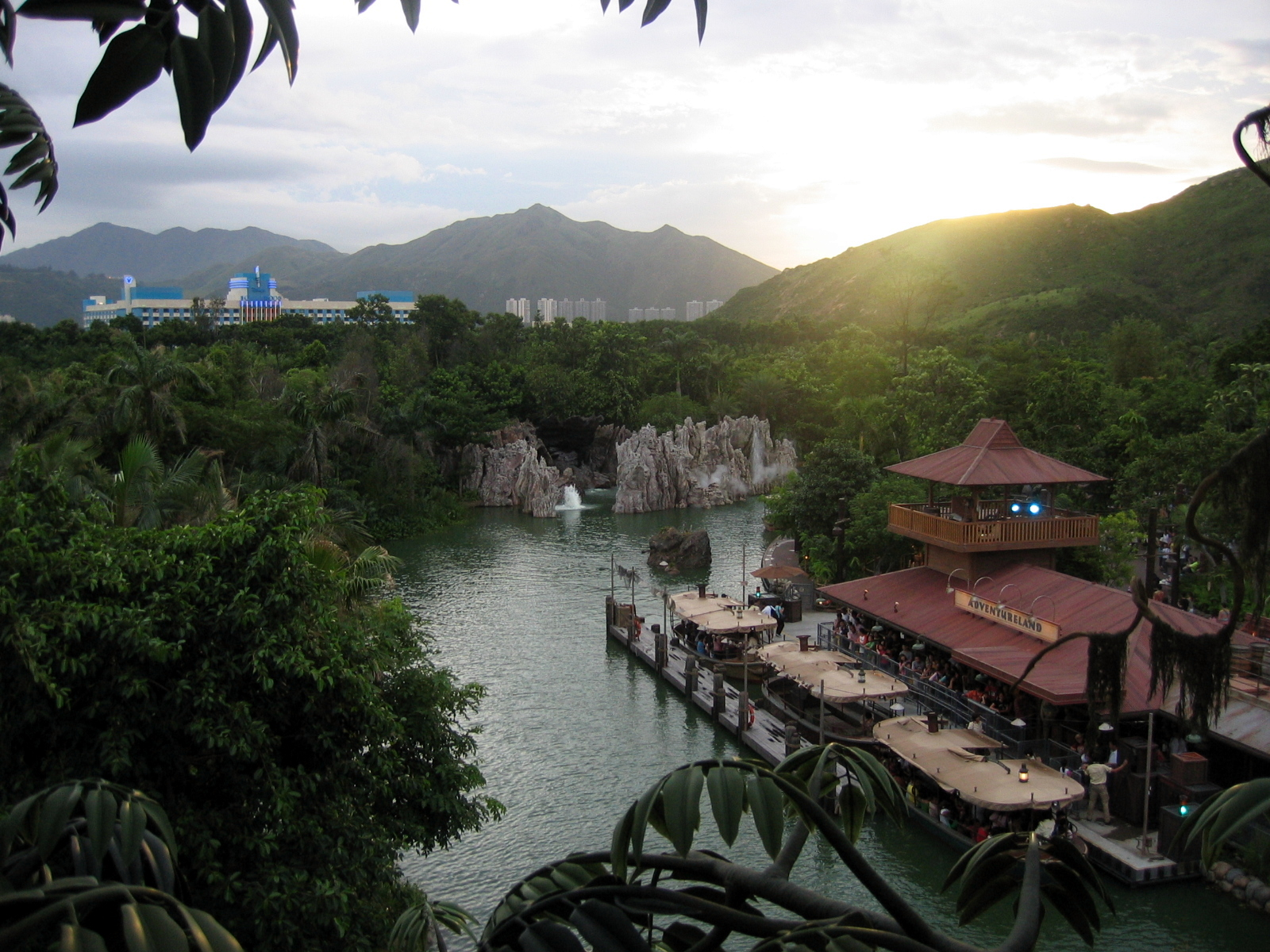 Jungle Cruise at Hong Kong Disneyland